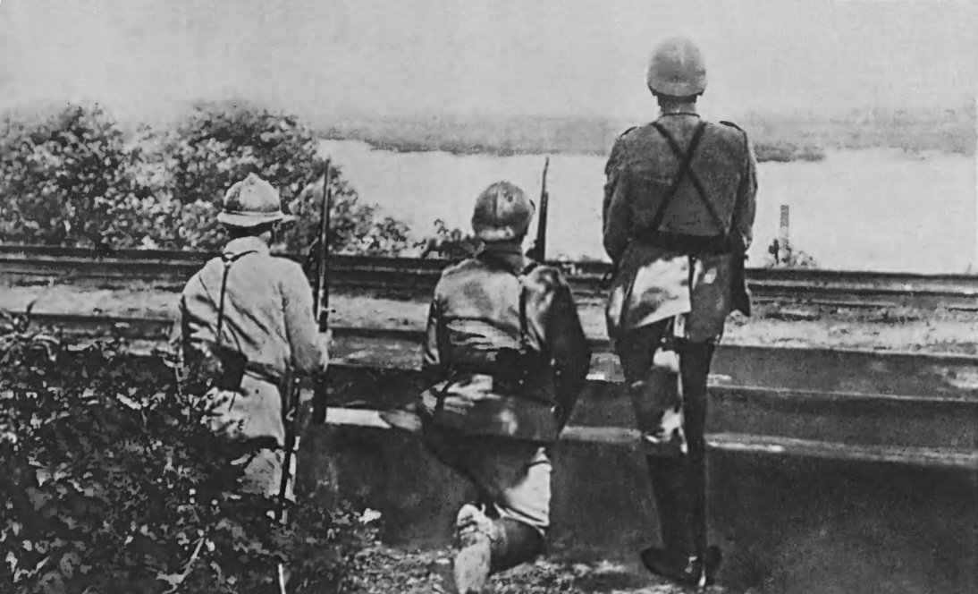 Wojna polsko-sowiecka. Polska placówka nad Dnieprem w 1920 r.